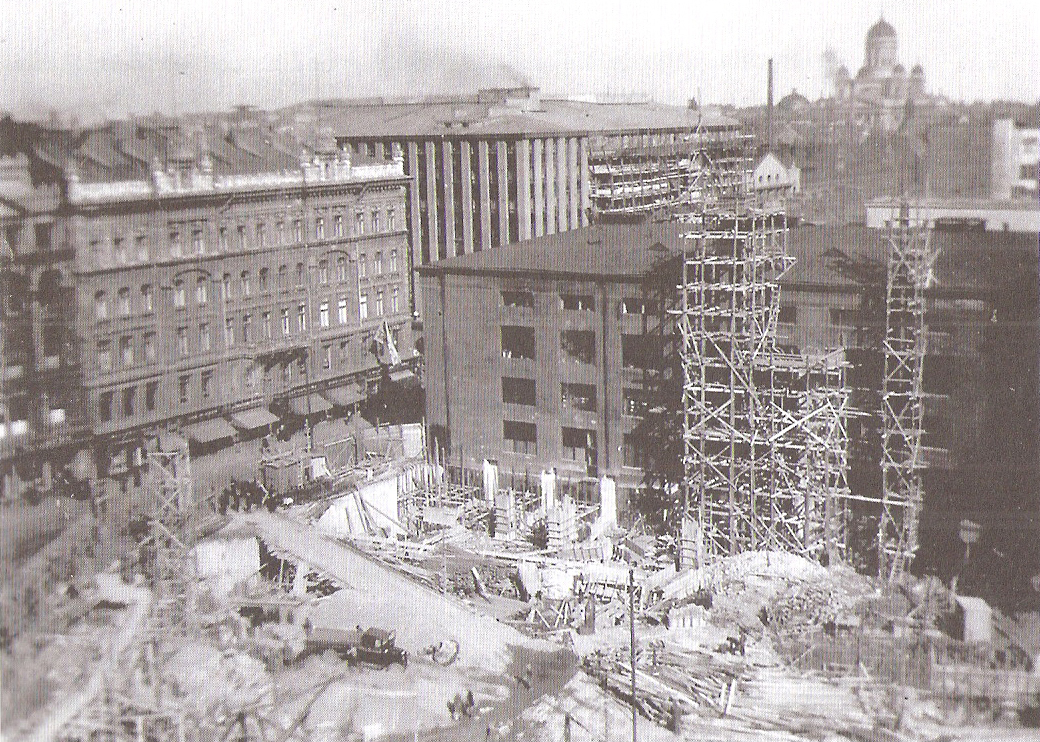 Stockmannin tavaratalo rakenteilla 1926-1930.